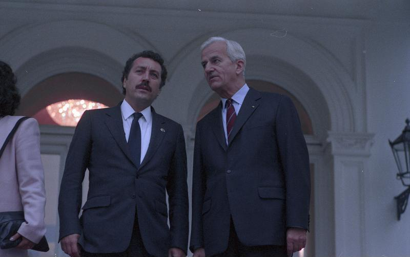 11.-15.10.1986 Besuch des Präsidenten von Guatemala, Lic. Marco Vinicio Cerezo Arévalo, und seiner Frau Lic. Raquel Blandon de Cerezo in der Bundesrapublik Deutschland. 11.10.1986- Begrüßung durch Bundespräsident Richard von Weizsäcker (rechts) vor dem Bundespräsidialamt.